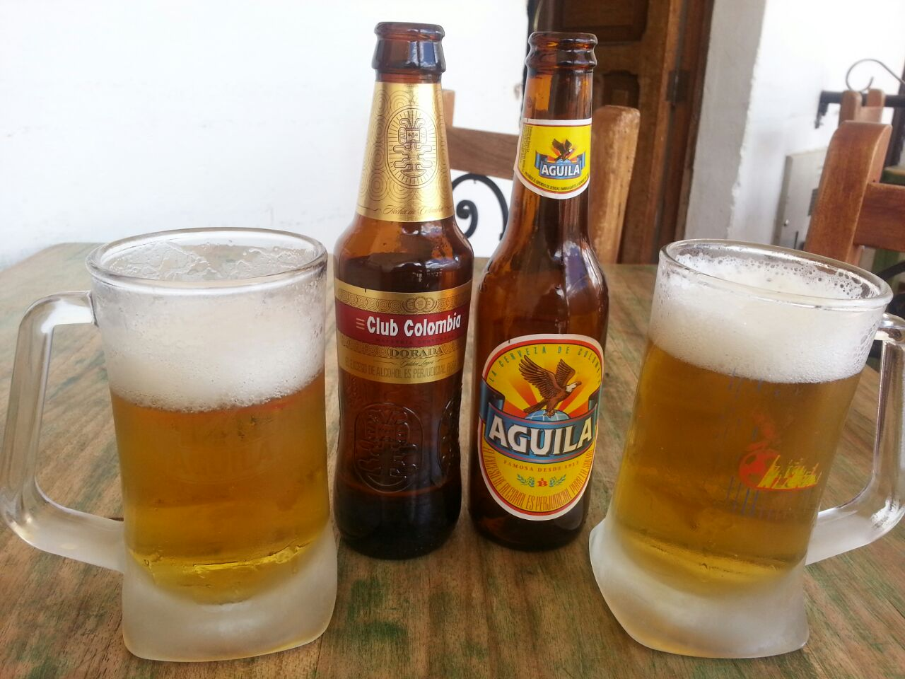 cervezas colombianas